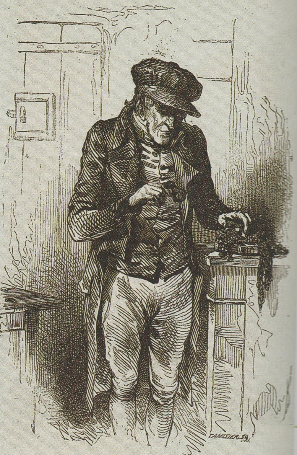 Illustration du personnage de Gobseck pour l'édition Furne de La Comédie humaine de Balzac.